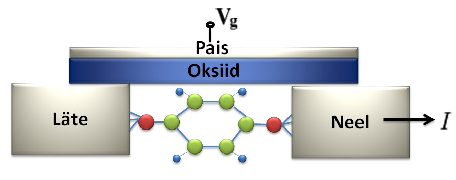 Väljaefektiga molekulaartransistor: paisu pinge Vg tüürib indutseeritud laenguid ja seeläbi ka voolu I.